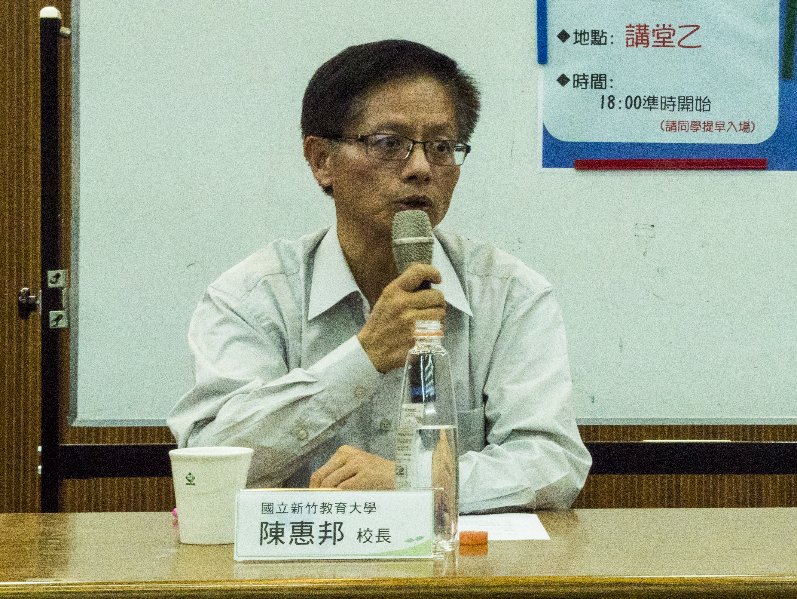 陳惠邦與賀陳弘